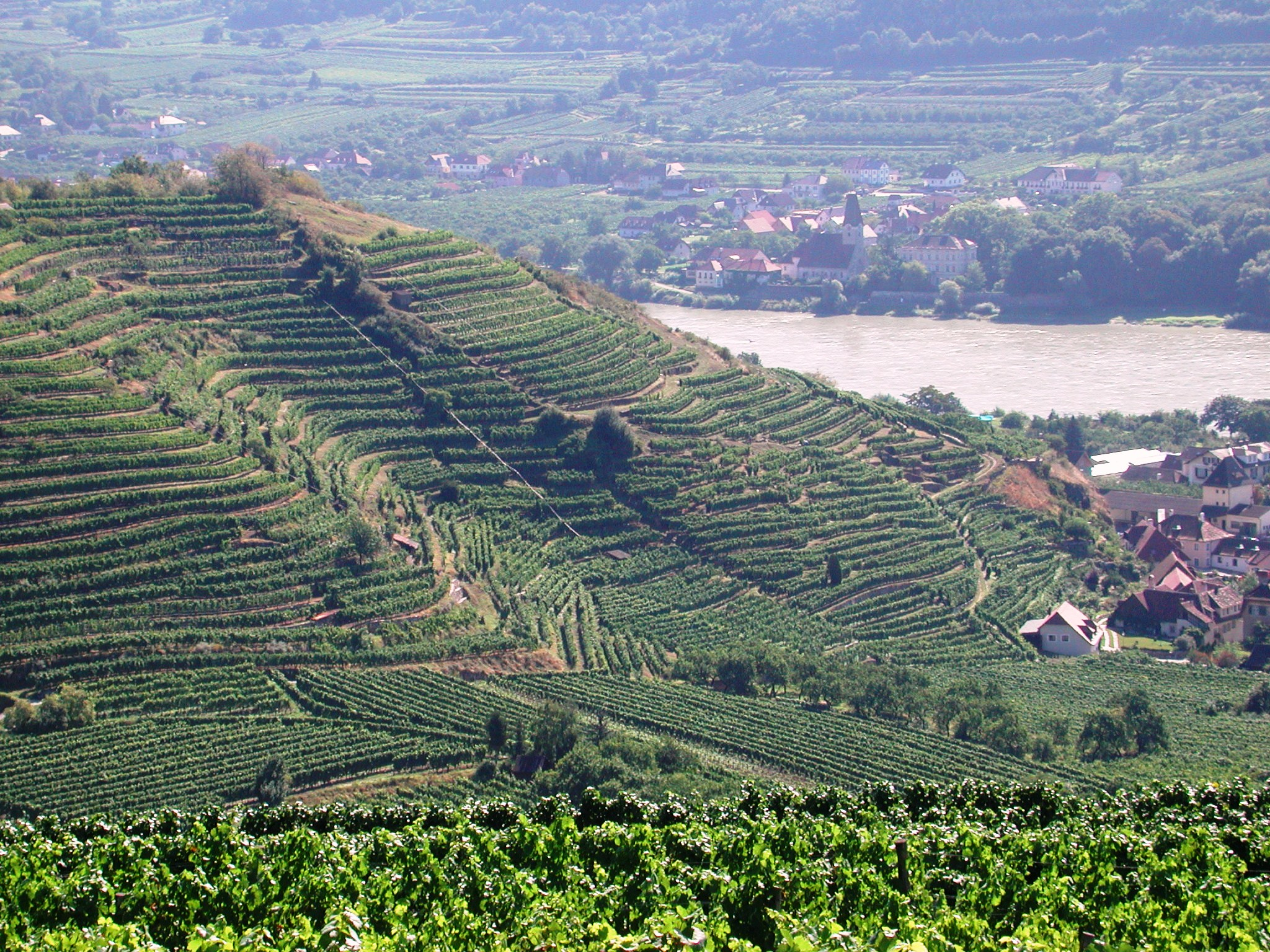 Weingartenlage "Singerriedel" in Spitz an der Donau